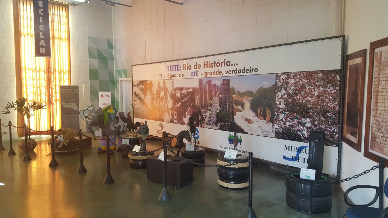 Obras compostas por objetos recicláveis.